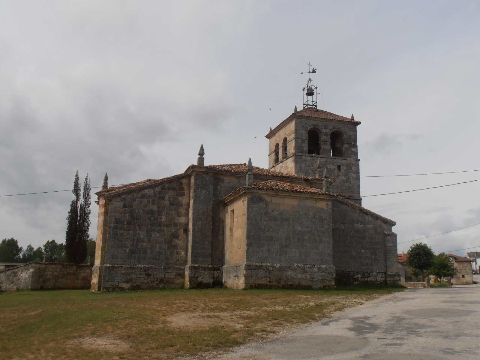 Alfoz de Santa Gadea